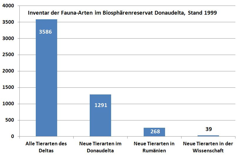 Inventar der Fauna-Arten im Biosphärenreservat Donaudelta, Stand 1999.JPG